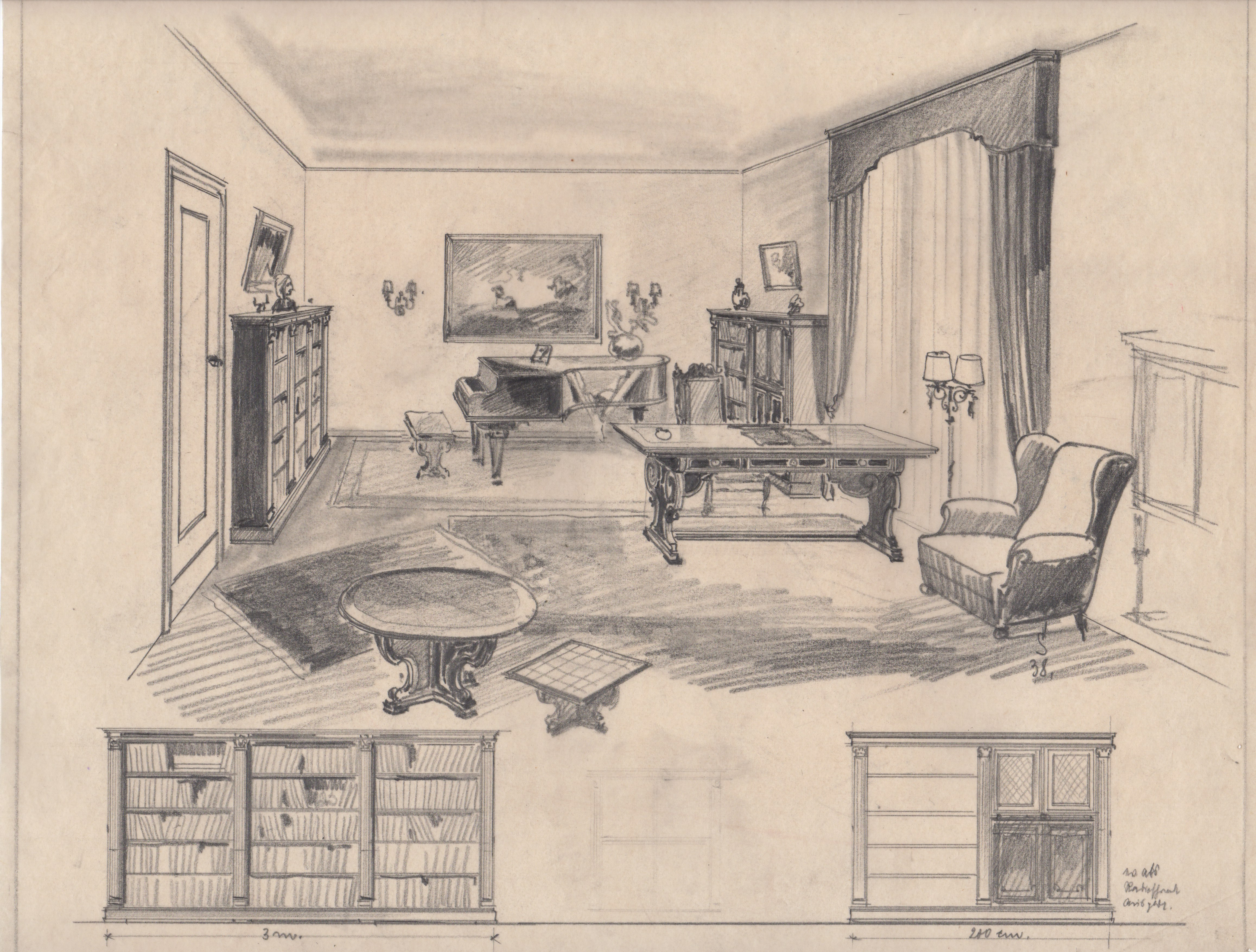 Raumperspektive 1938, traditionelle Wohneinrichtung in altdeutschem Stil mit Ergänzungsvorschlägen durch Ansichten (M 1:10) von Regalen